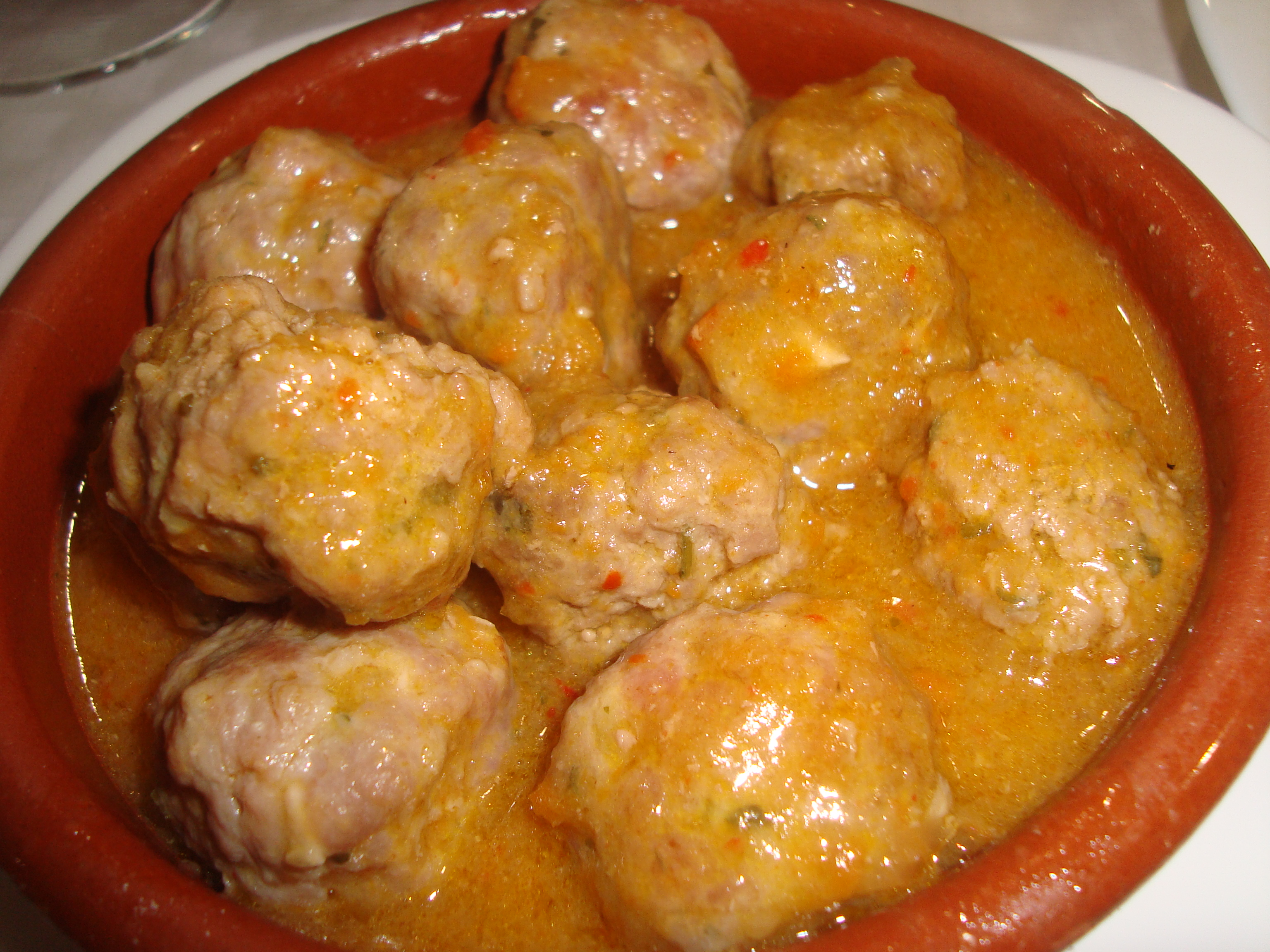 Albóndigas cocinadas en salsa